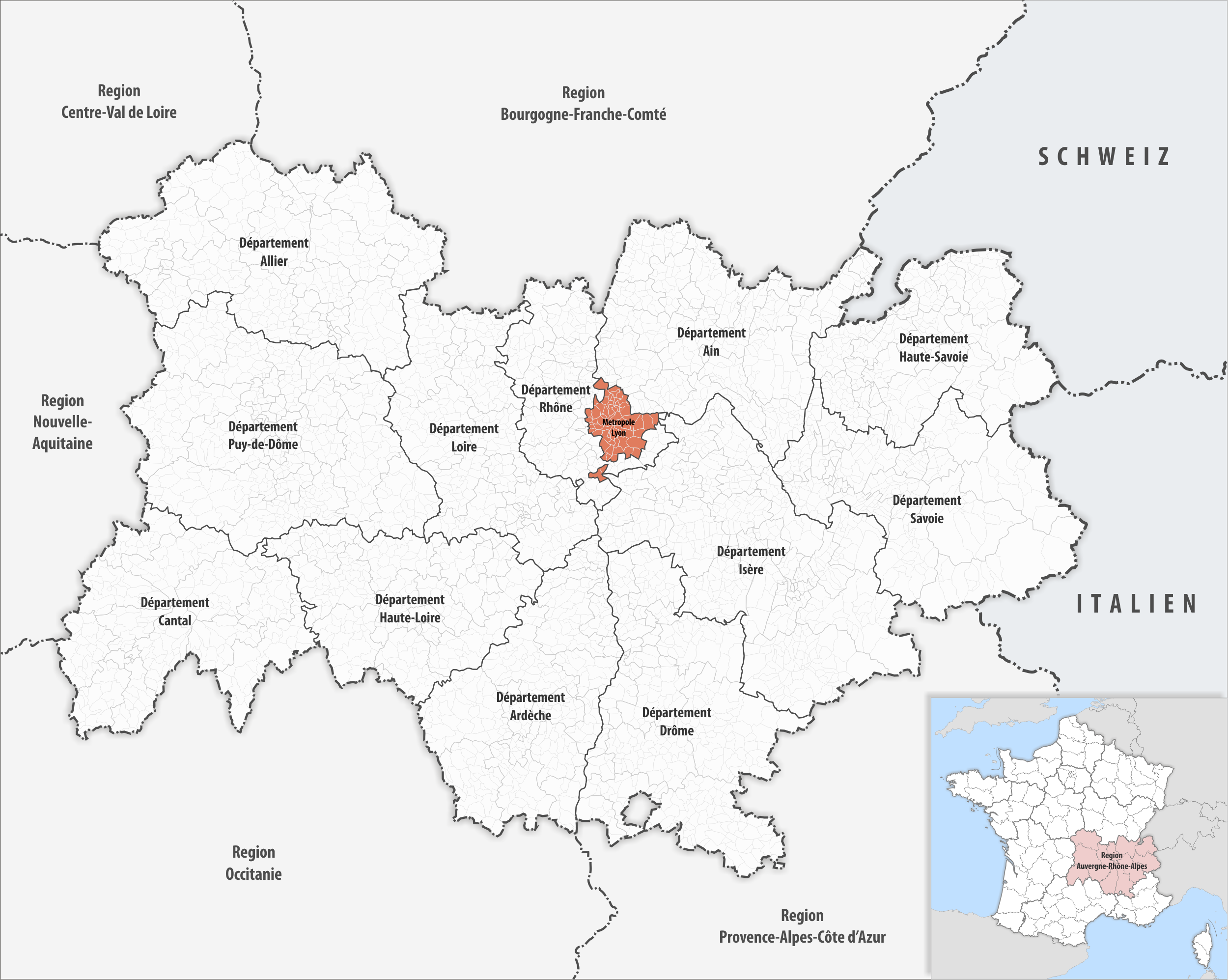 Lage des Departements Metropole Lyon